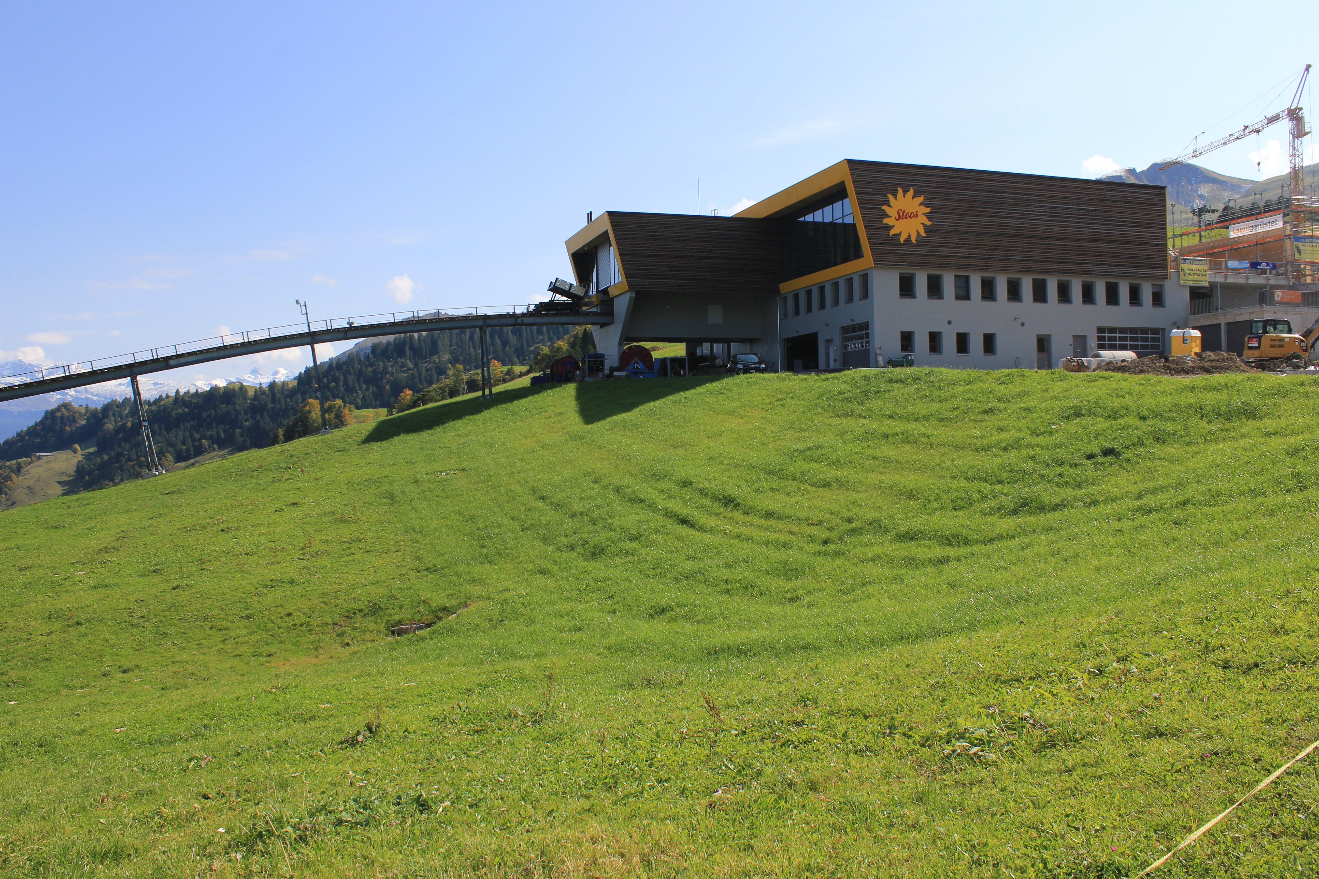 Neue Bergstation auf dem Stoos im September 2017